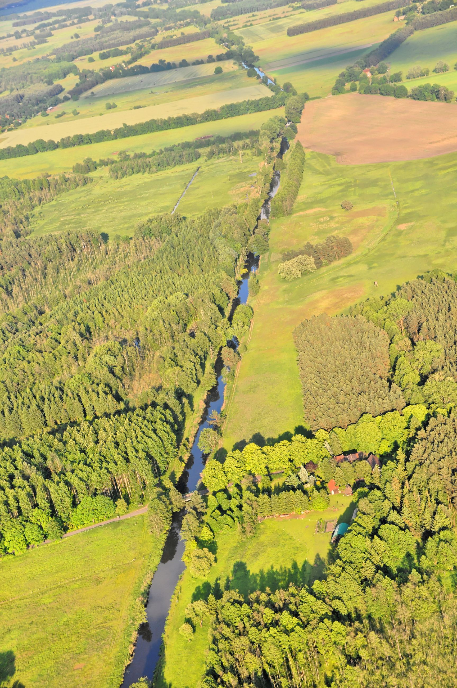 Überführungsflug vom Flugplatz Nordholz-Spieka über Lüneburg, Potsdam zum Flugplatz Schwarzheide-SchipkauDer Rhin bzw. Rhinkanal kurz vor der Einmündung in den Dreetzer See. Über die Brücke verläuft die Straße von Bartschendorf nach Lüttgendreetz in der Gemeinde Dreetz im Brandenburgischen Landkreis Ostprignitz-Ruppin.